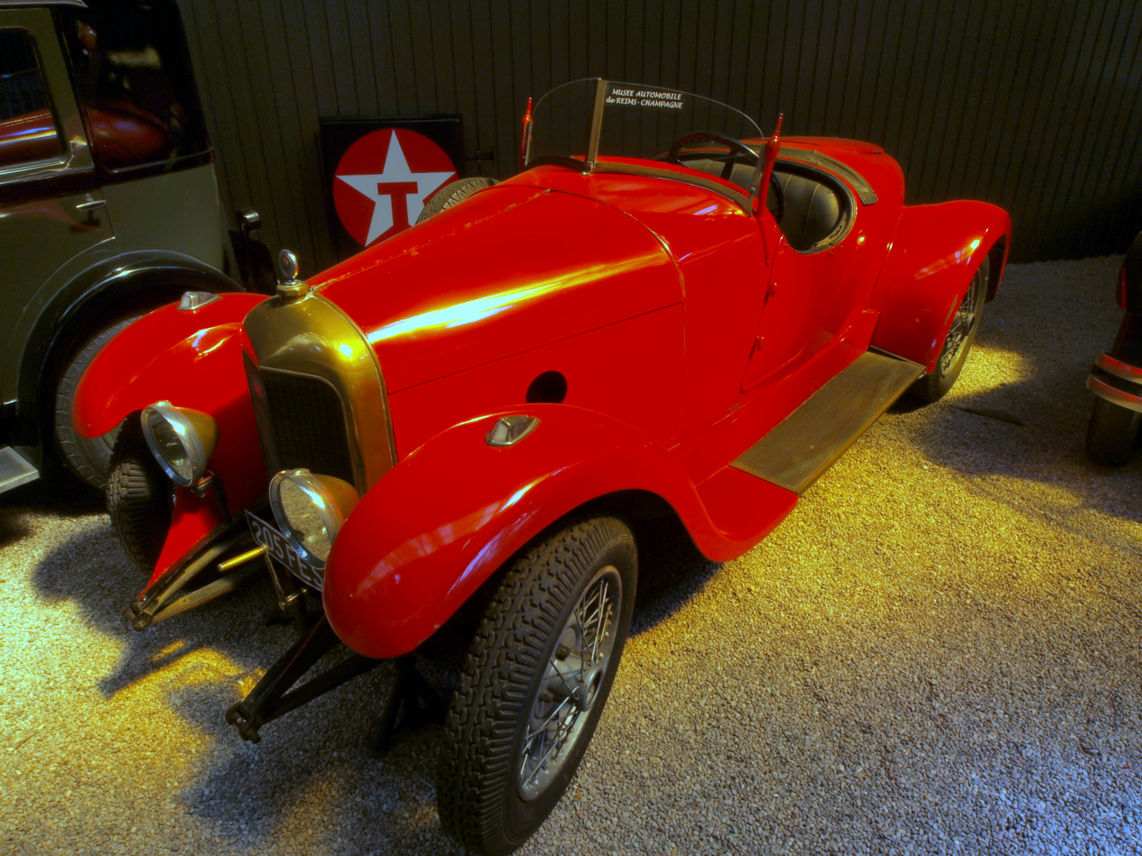 CIME A2